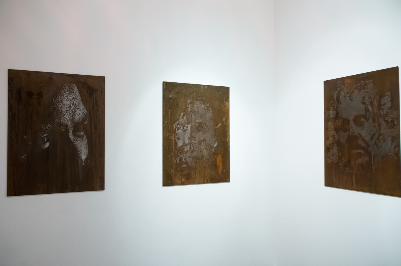 VHILS